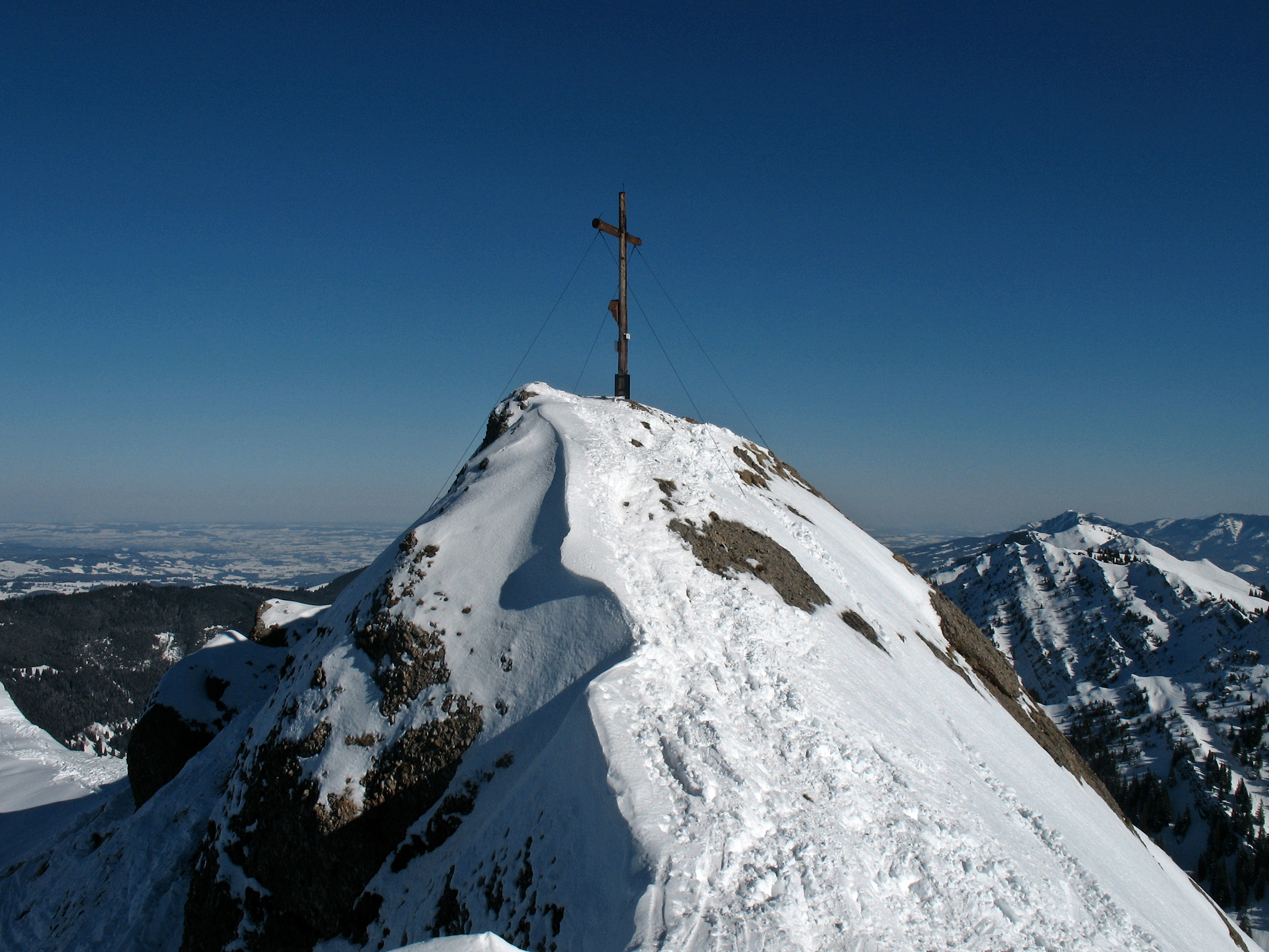 Gipfelkreuz auf dem Rindalphorn (1821 m), rechts daneben der Buralpkopf (1772 m).